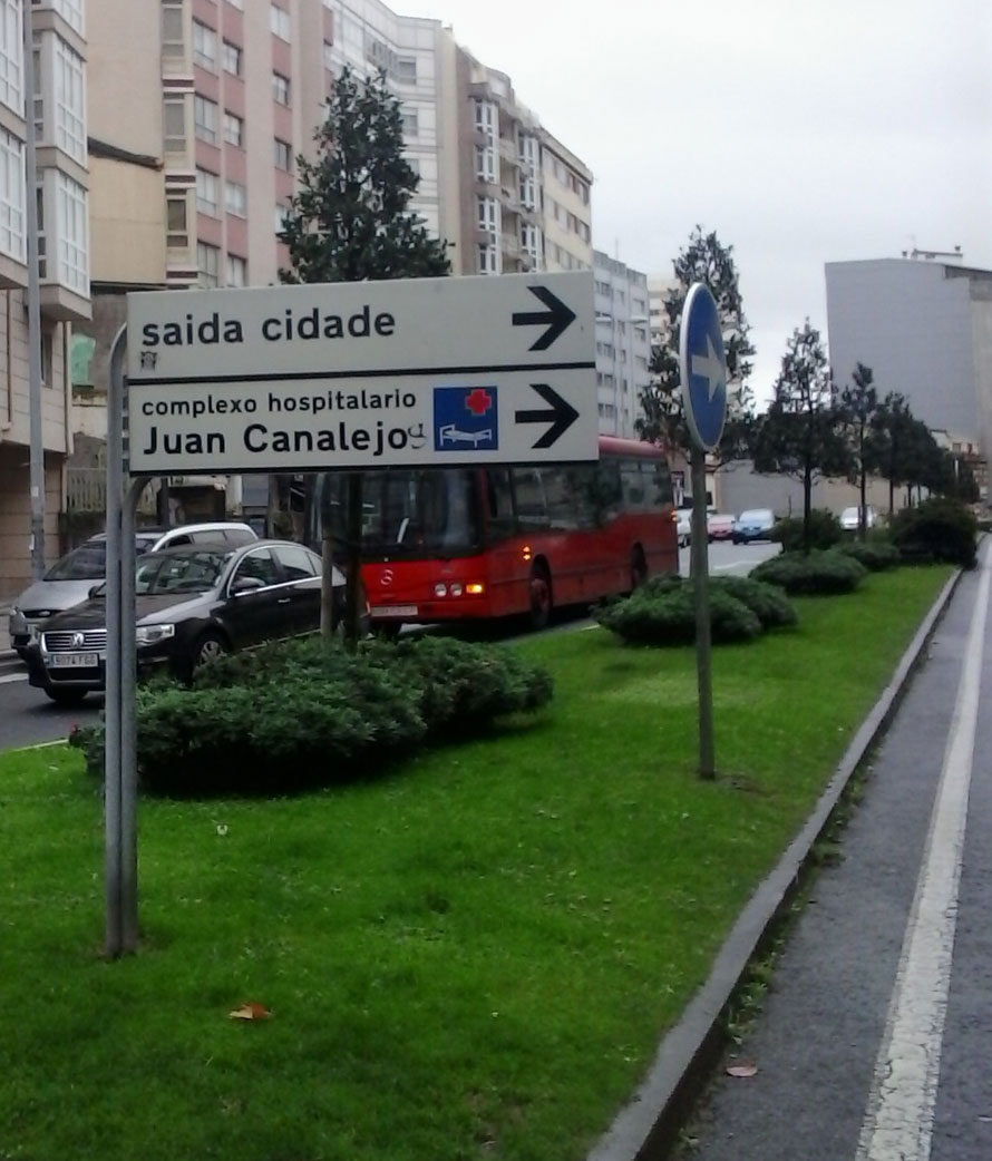 cartel Juan Canalejo Hospital A Coruña Galiza Spain